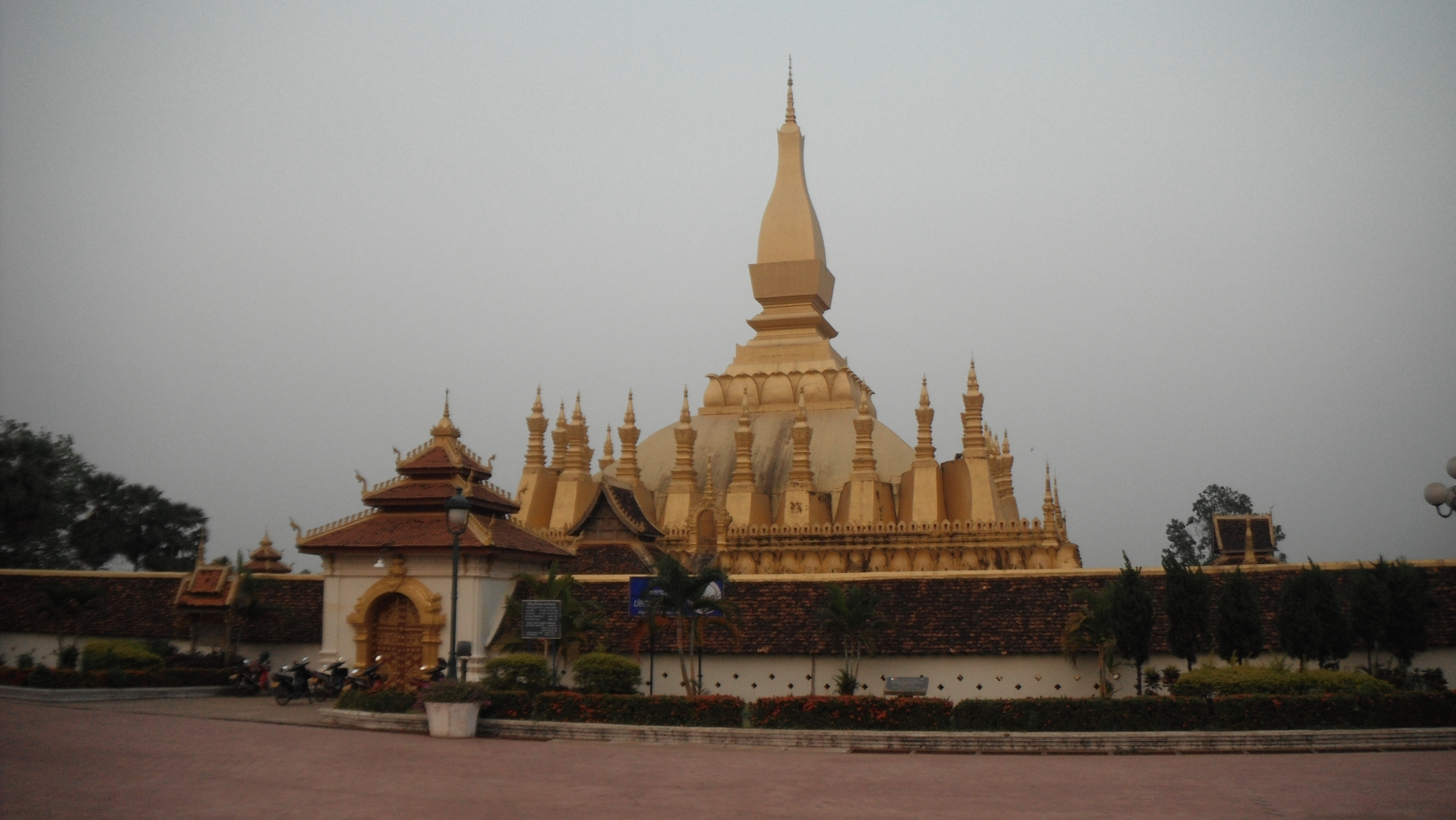 พระธาตุหลวง (กำแพงนครเวียงจันทน์)